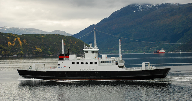 MF Sognefjord i rute Bruravik-Brimnes. Bygging av Hardangerbrua i bakgrunnen.